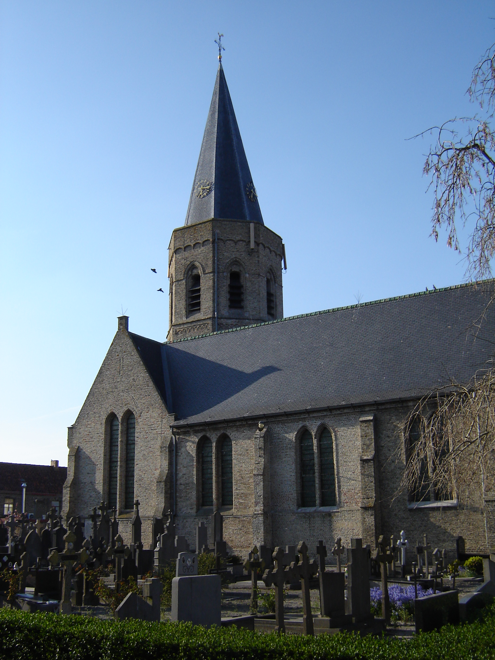 Sint-Niklaaskerk in Leke en kerkhof Church of Saint Nicholas with churchyard in Leke, Diksmuide, West Flanders, Belgium